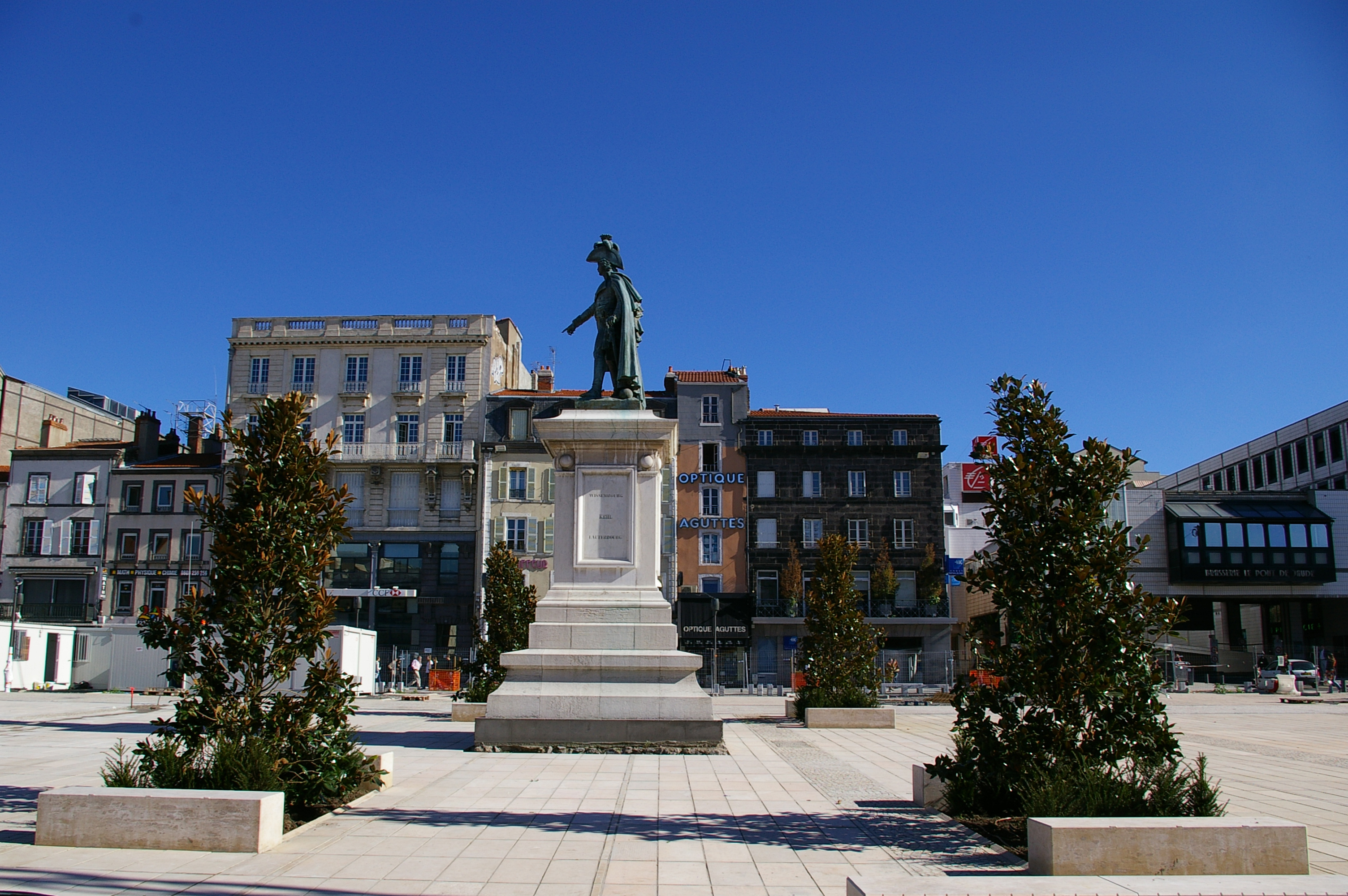 *Place de Jaude juste après la plantation des lauriers-tulipiers 3 Partie centrale - Statue du général Desaix - Magnolia grandiflora 25 octobre 2005